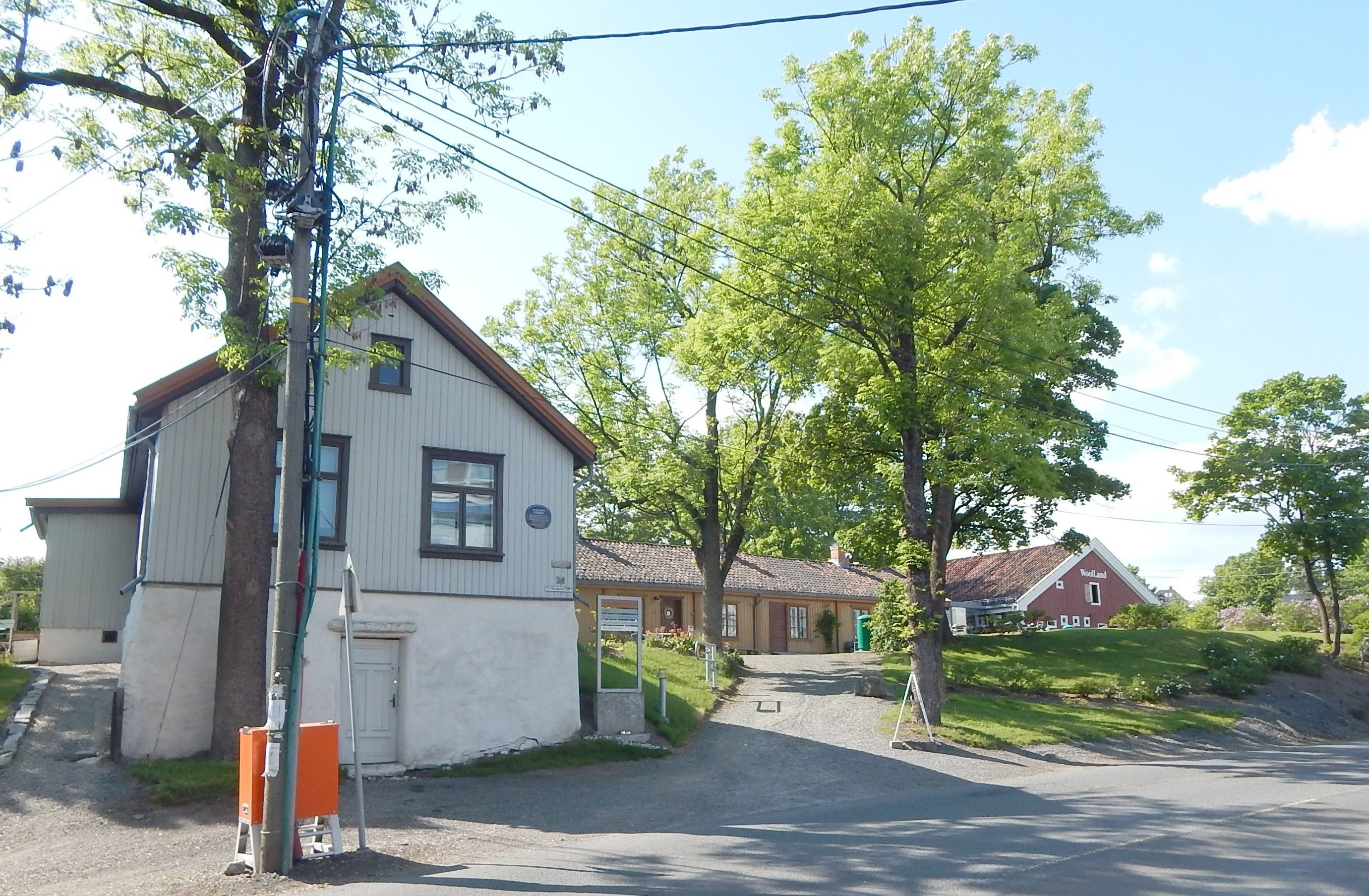 Schlägergården (tidligere Ørakerbråten)